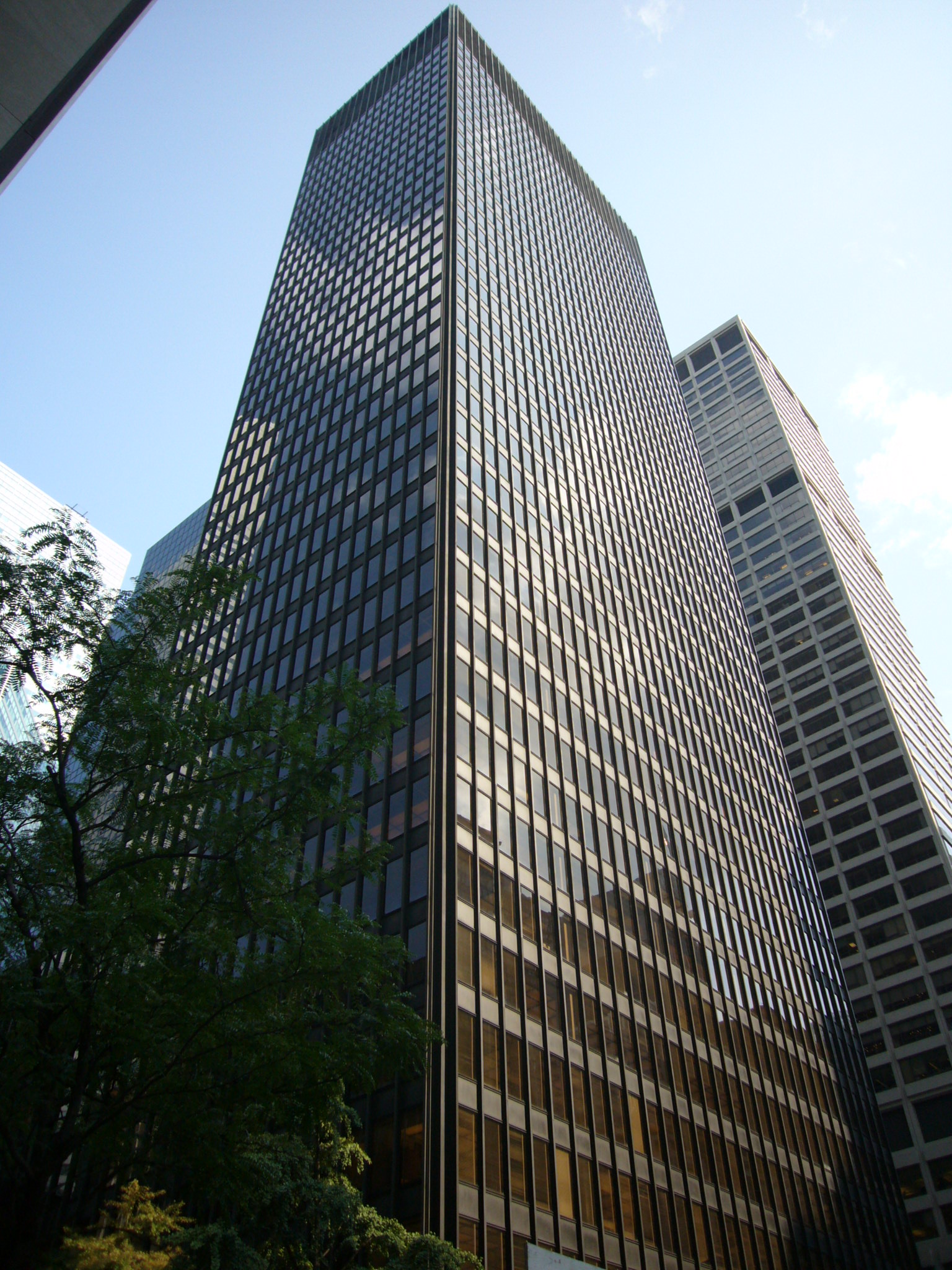 Seagram Building, New York City.